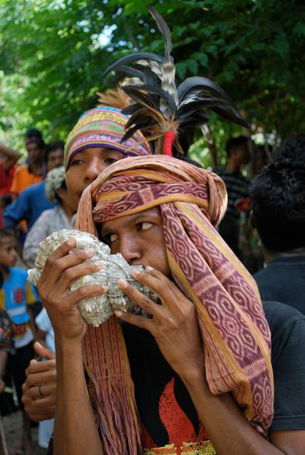 Muschelhorn in Osttimor